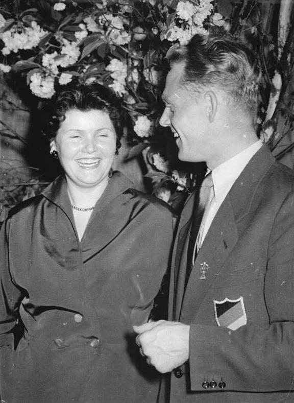 Gustav-Adolf Schur, Rudolf Harbig Zentralbild Wlocka 11.5.1955 - VIII. Internationale Friedensfahrt Prag-Berlin-Warschau 1955. Am Ruhetag in Leipzig gab die Regierung der DDR einen Empfang für die Friedensfahrer. UBz: "Täve" Schur (DDR) im Gespräch mit Gerda Harbig, der Frau unseres unvergessenen Weltrekordläufers Rudolf Harbig.